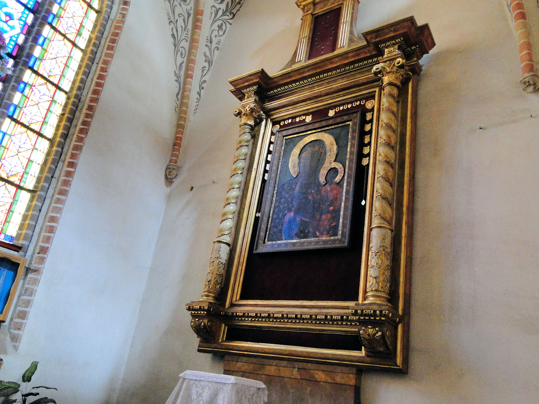 Kościół Mariacki w Stargardzie Szczecińskim